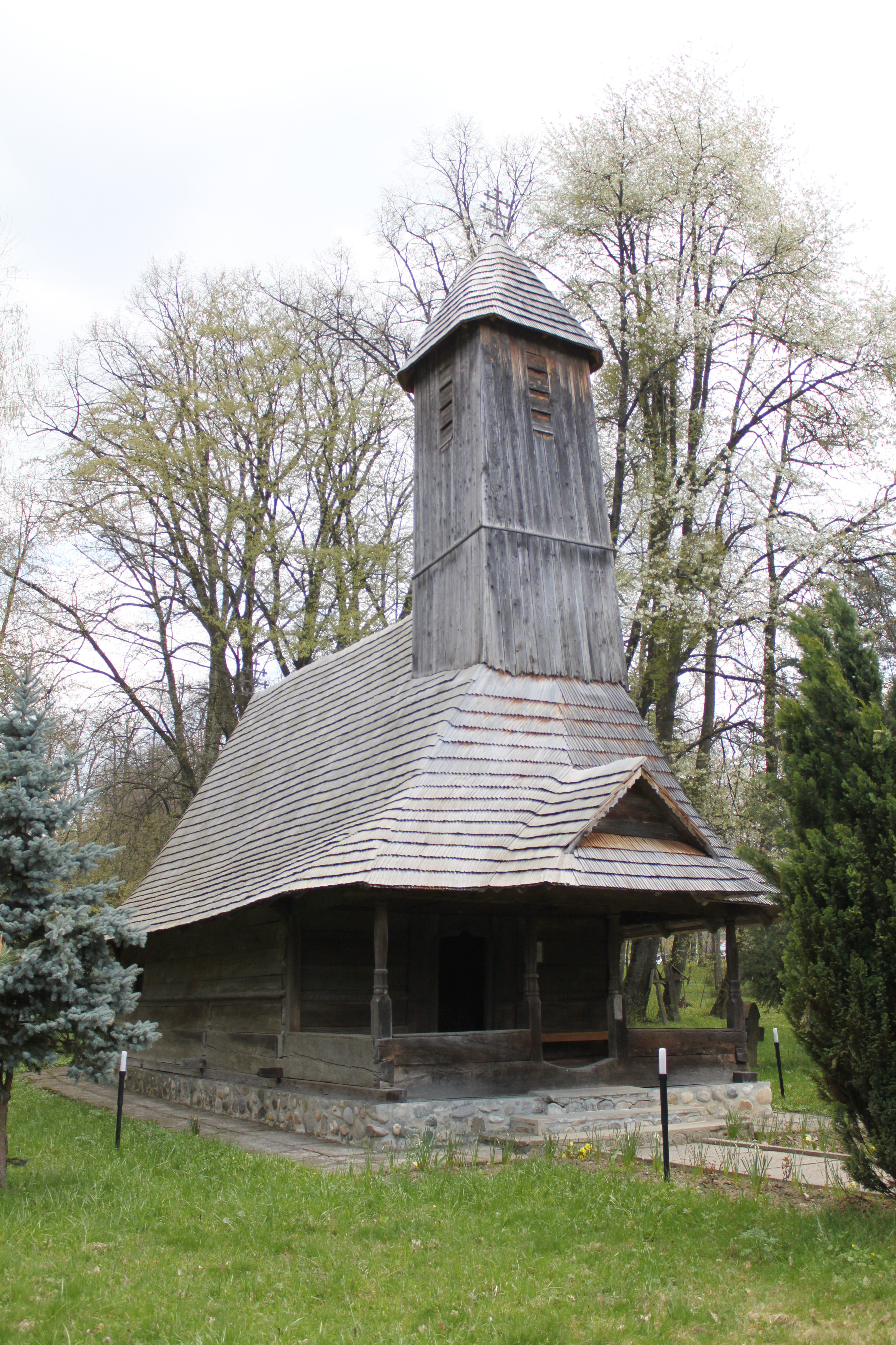 Biserica de lemn din Palanga, judeţul Vâlcea.